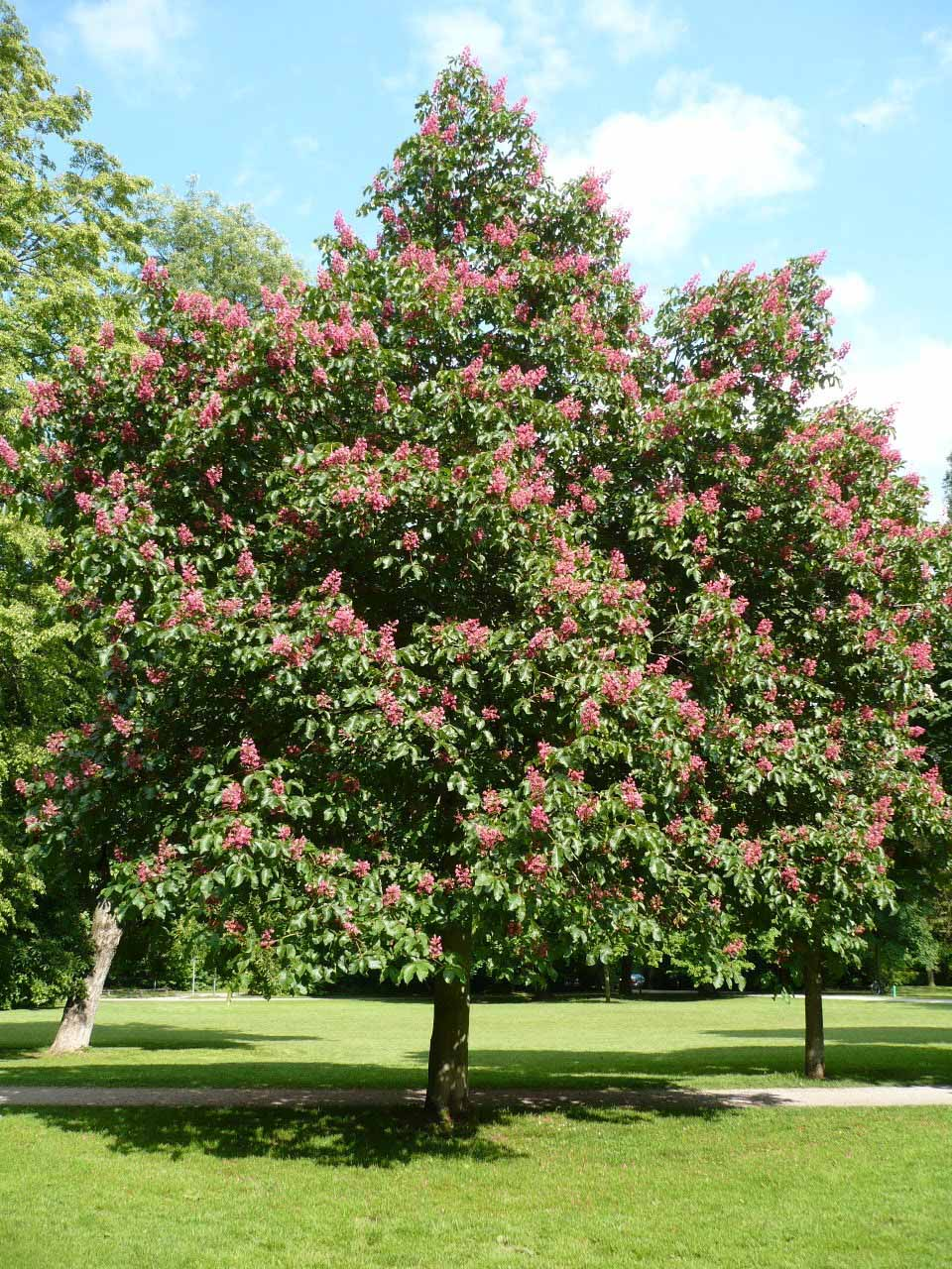 Fleischrote Rosskastanie (Aesculus × carnea) Baum